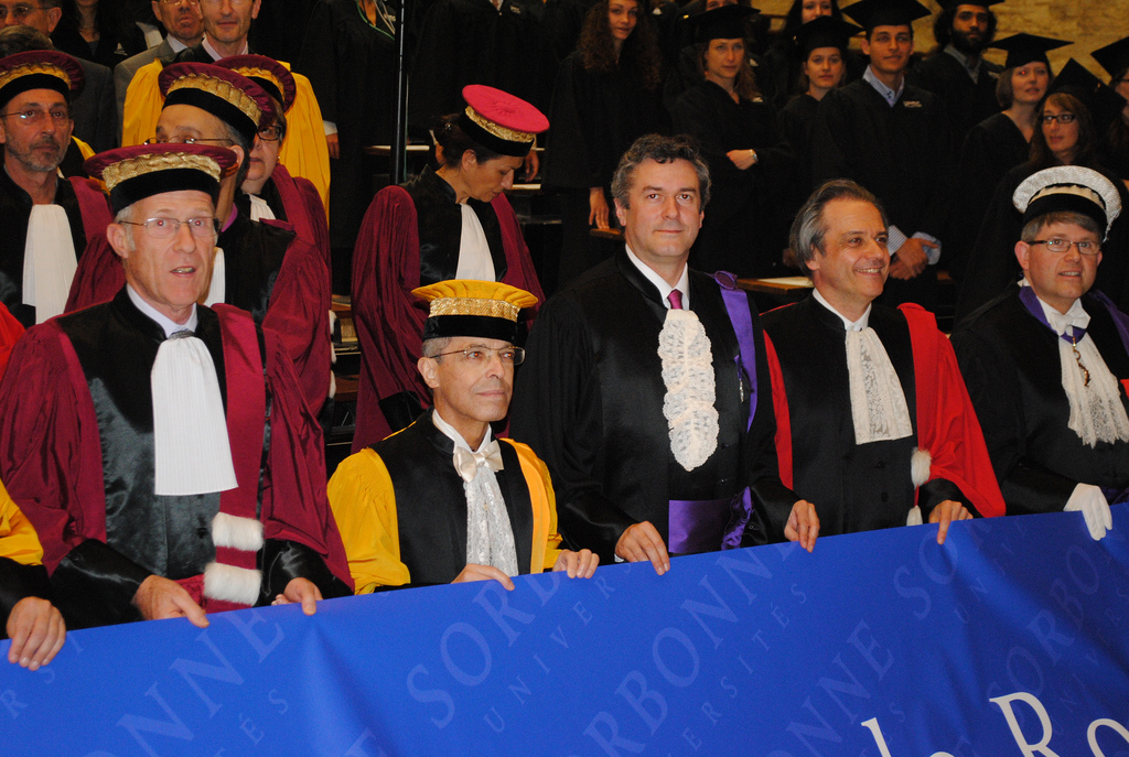 De gauche à droite : Jean-Charles Pomerol, Georges Molinié, Édouard Husson, Louis Vogel et Patrick Hetzel lors de la remise des diplômes de docteurs de Sorbonne universités le 14 mai 2011.